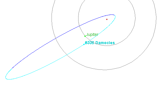 Bahnvergleich (5335) Damocles-Saturn-Jupiter